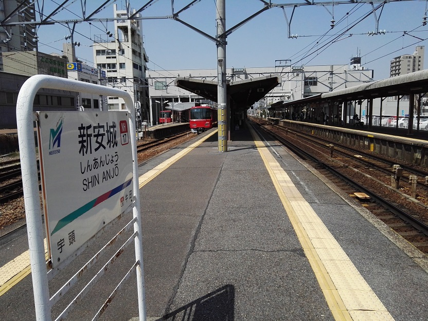 Shin anjo station platform